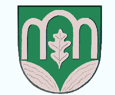 Wappen der Gemeinde Kalbe (Niedersachsen), selbst erstellt, Vorlage Abbildung und Artikel in der Rotenburger Rundschau vom 12.04.2010